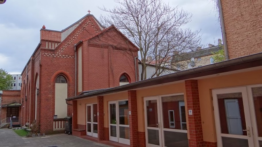 Hofansicht der Hofkirche Köpenick